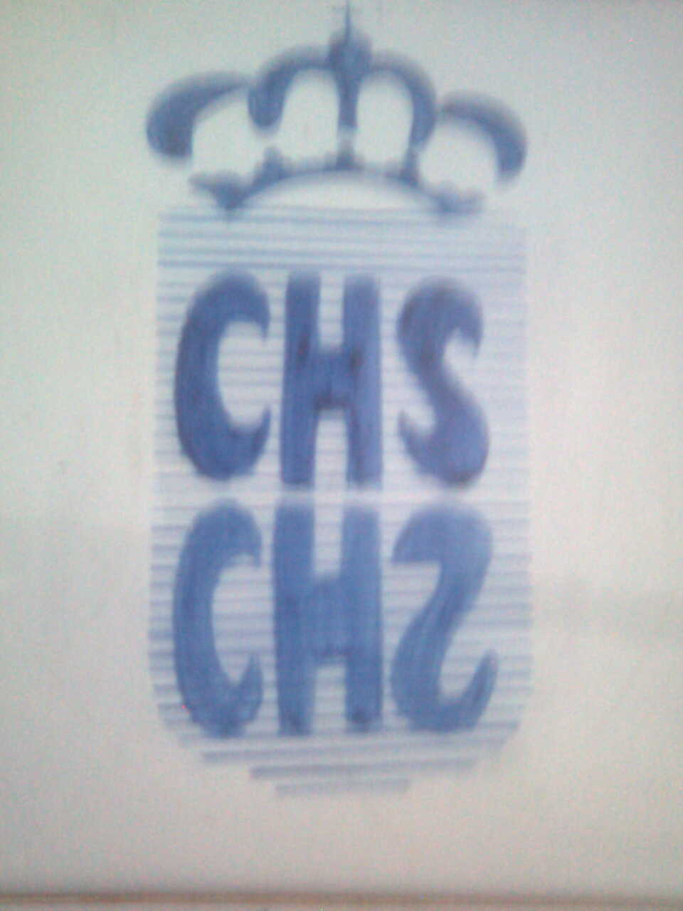 Fotografía del escudo de la Confederación Hidrográfica del Segura